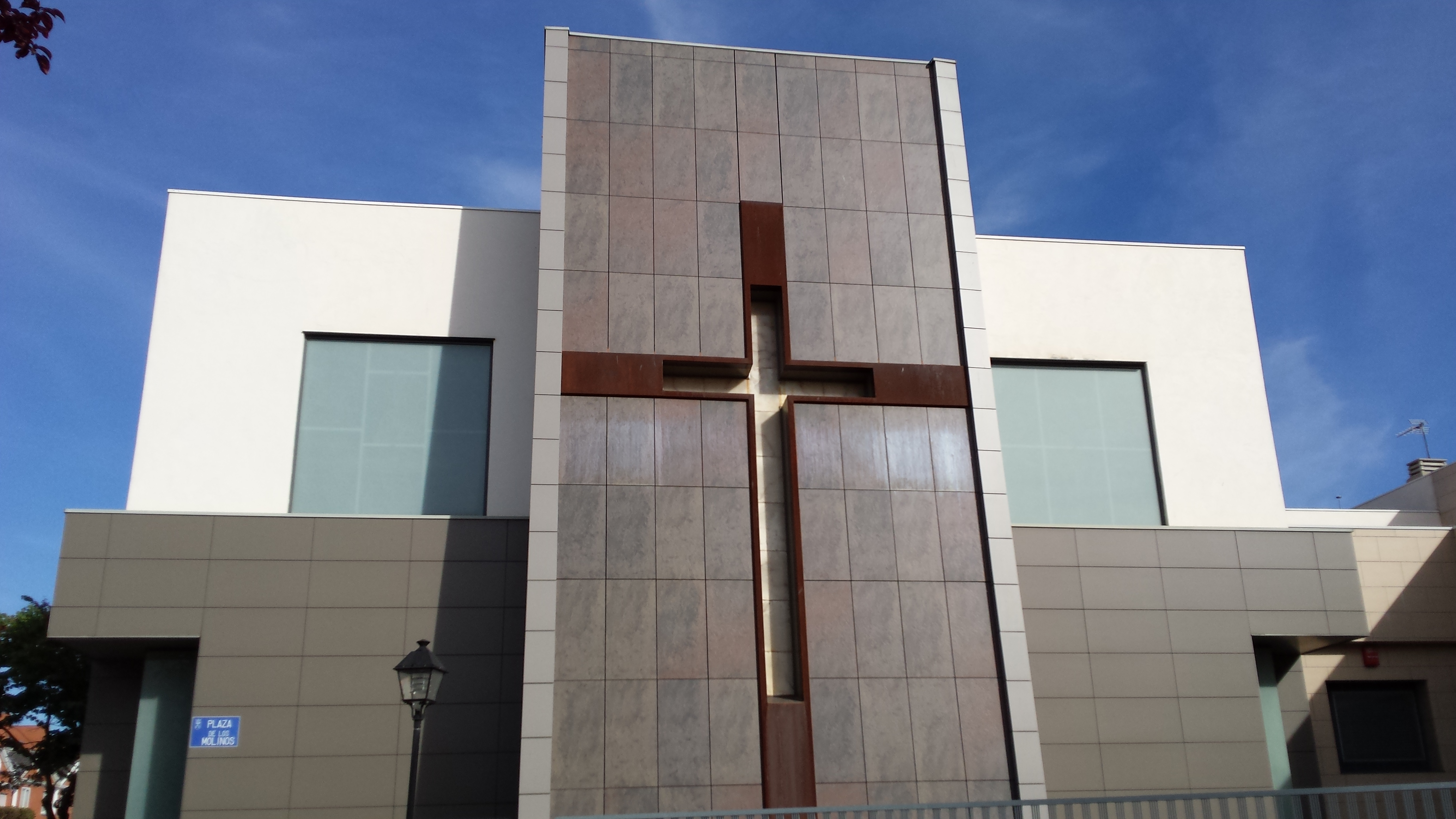 Parroquia de la Resurrección del Señor. Albacete